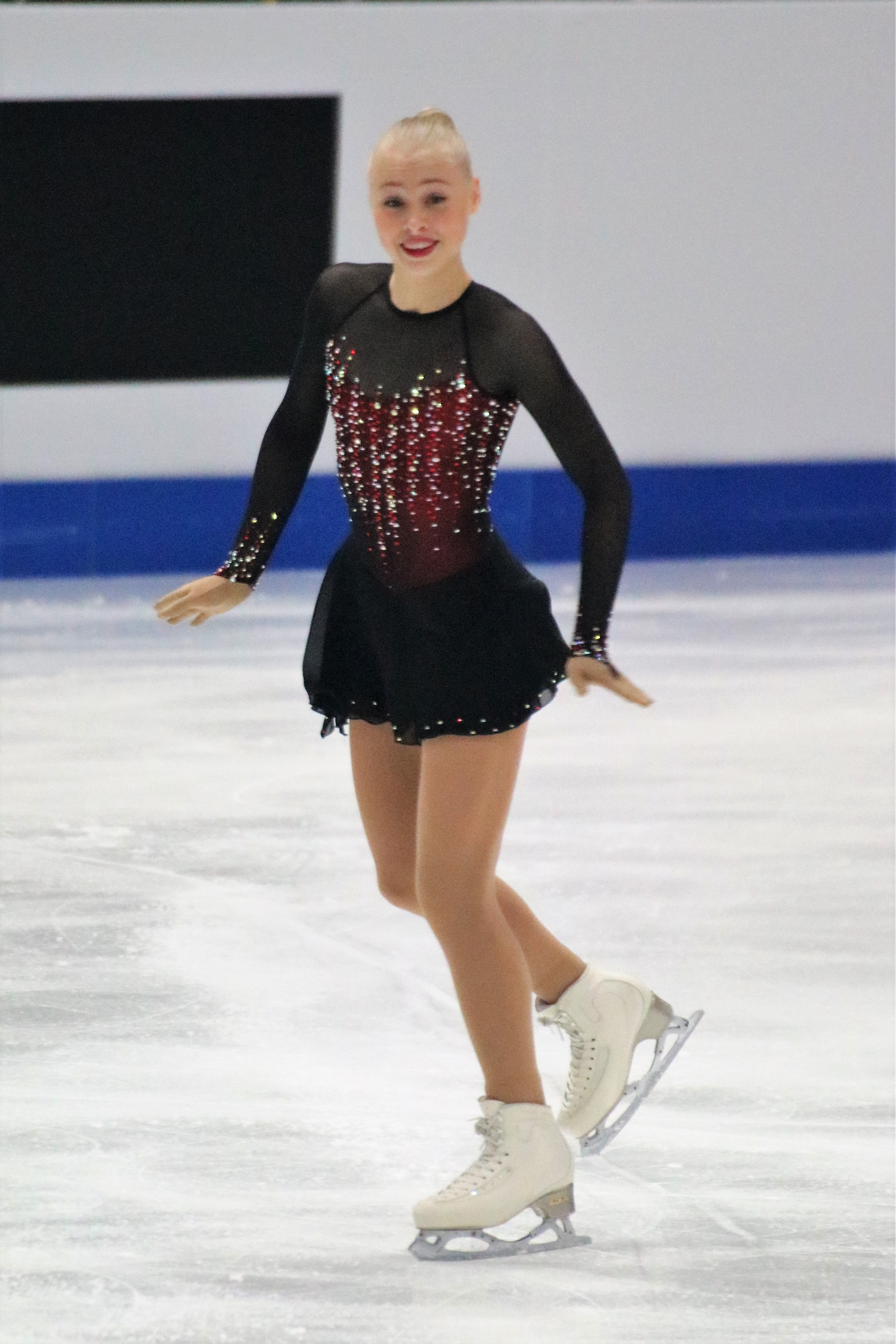 Линнеа Седер (Финляндия) на чемпионате Европы по фигурному катанию 2020